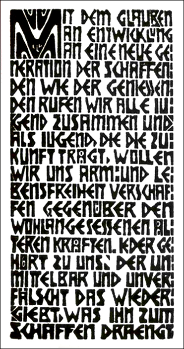 Das Programm der expressionistischen Künstlergemeinschaft "Die Brücke" als Holzschnitt von Kirchner: "Mit dem Glauben an Entwicklung, an eine neue Generation der Schaffenden wie der Genießenden rufen wir alle Jugend zusammen, und als Jugend, die die Zukunft trägt, wollen wir uns Arm- und Lebensfreiheit verschaffen gegenüber den wohlangesessenen älteren Kräften. Jeder gehört zu uns, der unmittelbar und unverfälscht wiedergibt, was ihn zum Schaffen drängt."